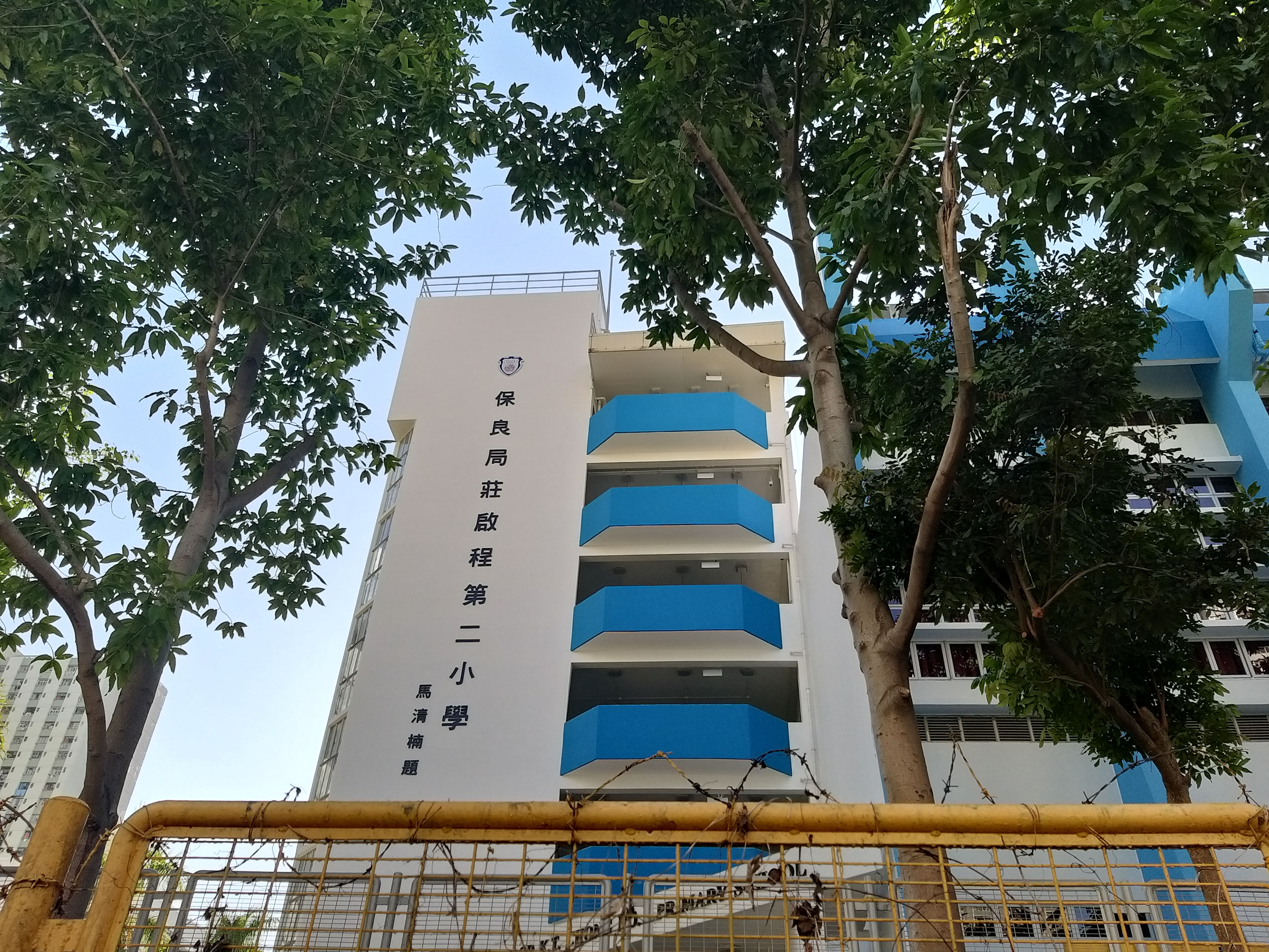 翻新後的正門